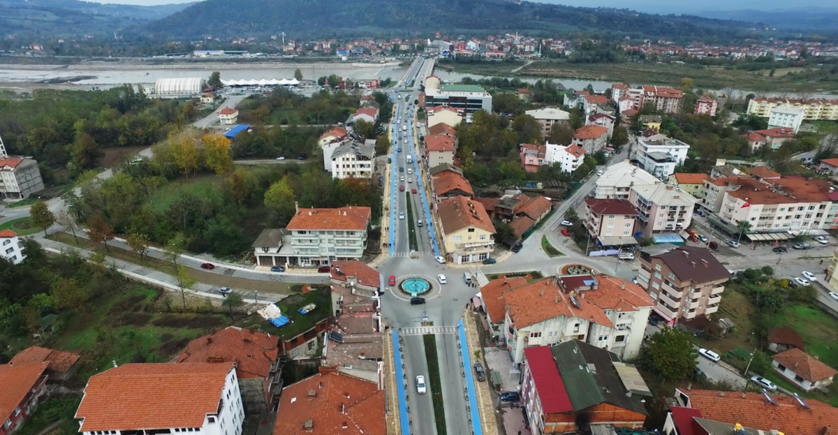 Çaycuma ilçesinden 2016 yılında bir fotoğraf